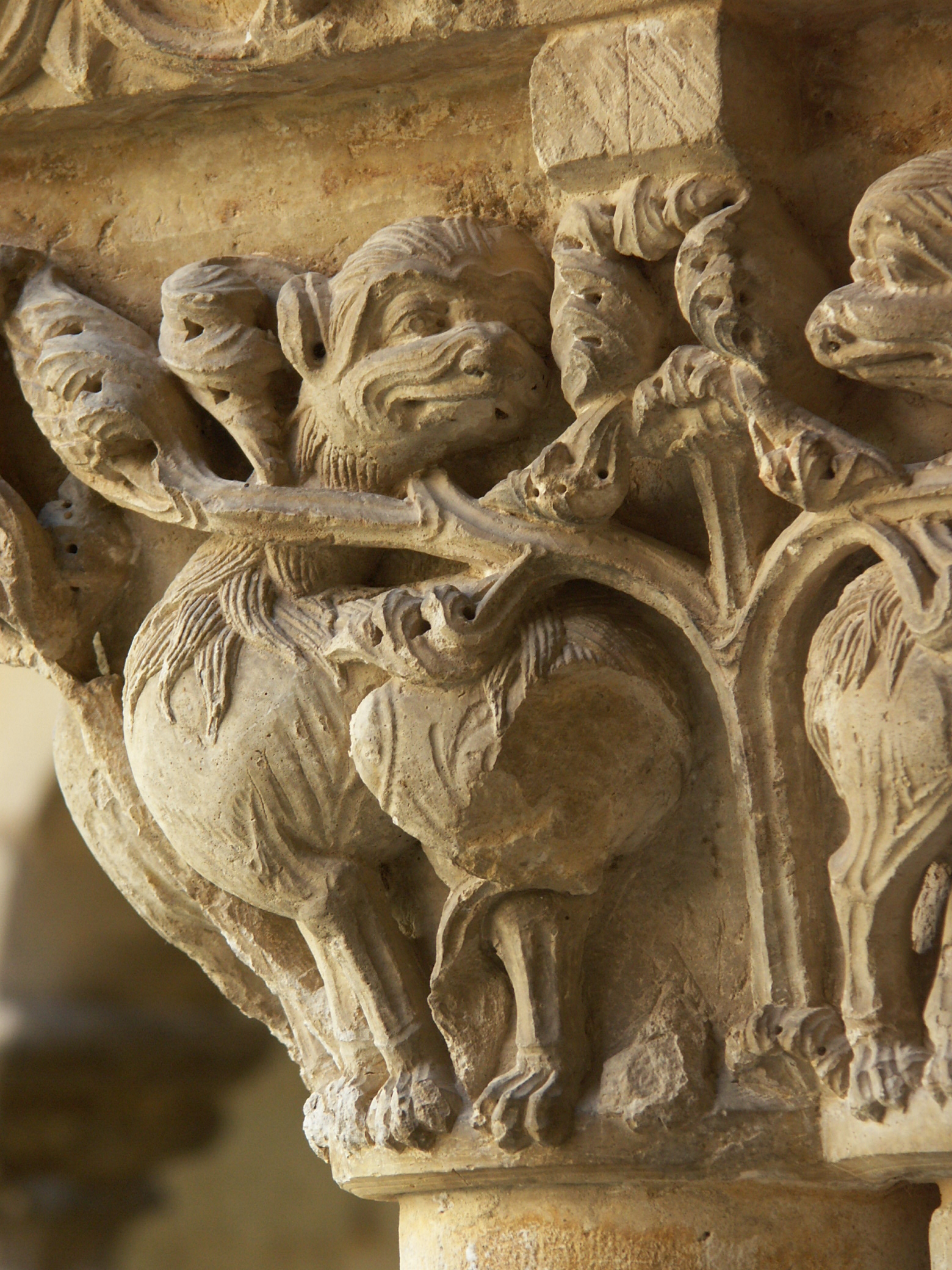 Fabelwesen, Sto. Domingo de Silos, Spanien, im Kreuzgang des Klosters